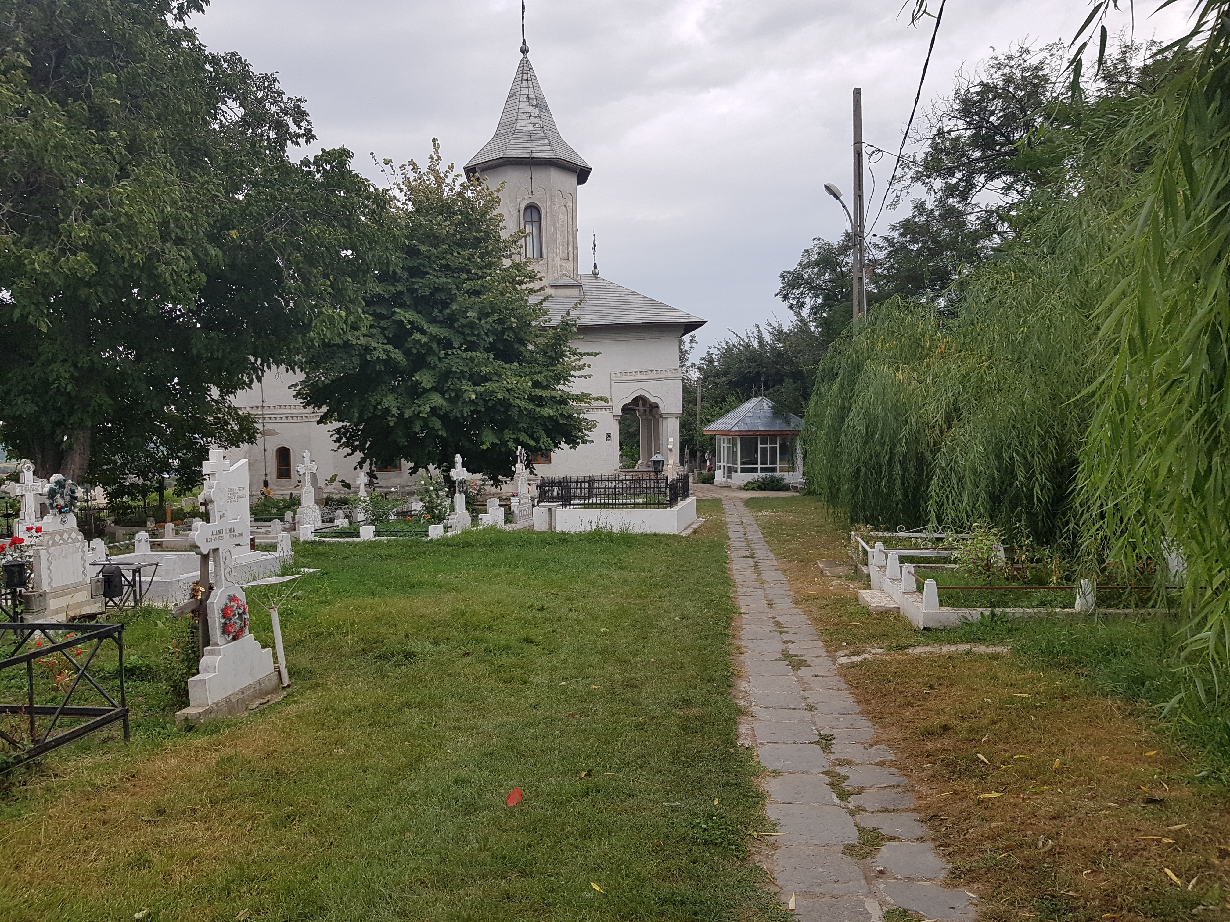 Biserica „Ovidenia”